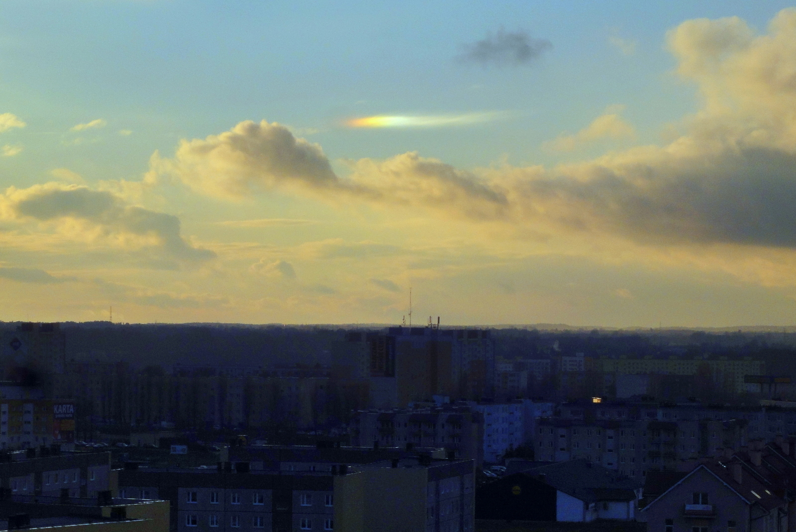 Słońce poboczne - Gorzów Wlkp., os. Górczyn w listopadzie 2012 r.